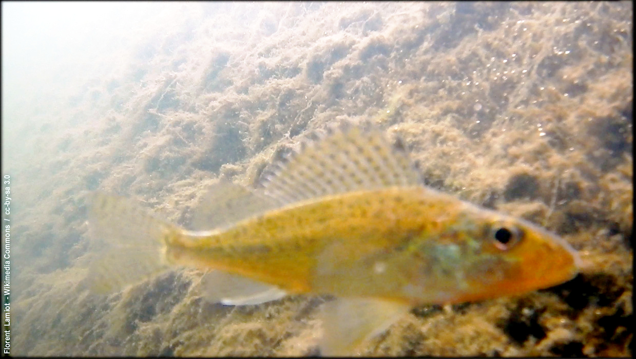 Grémille dans l'ancienne Deûle, à Lille (France), mai 2014